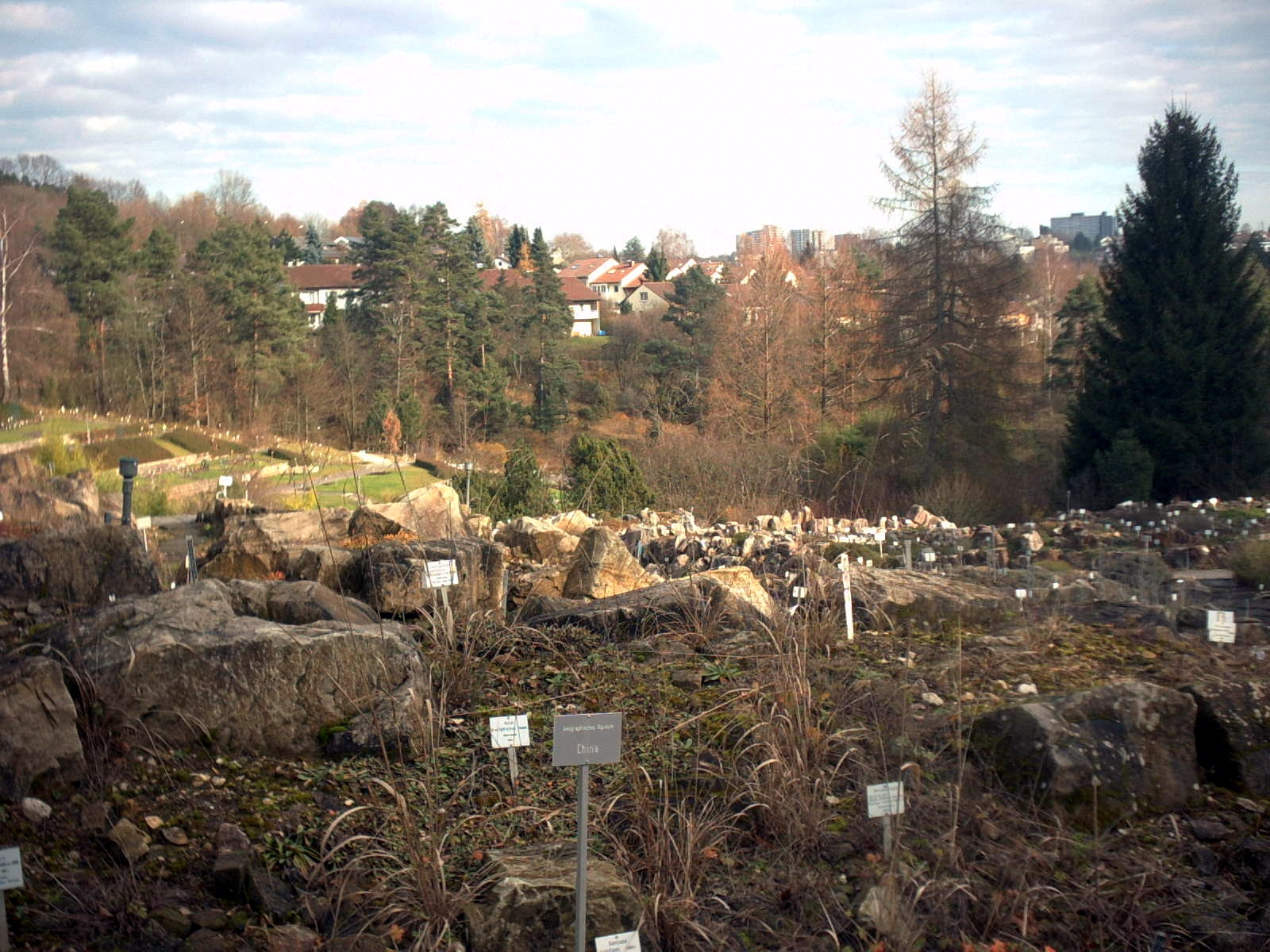 Tübingen - Neuer Botanischer Garten